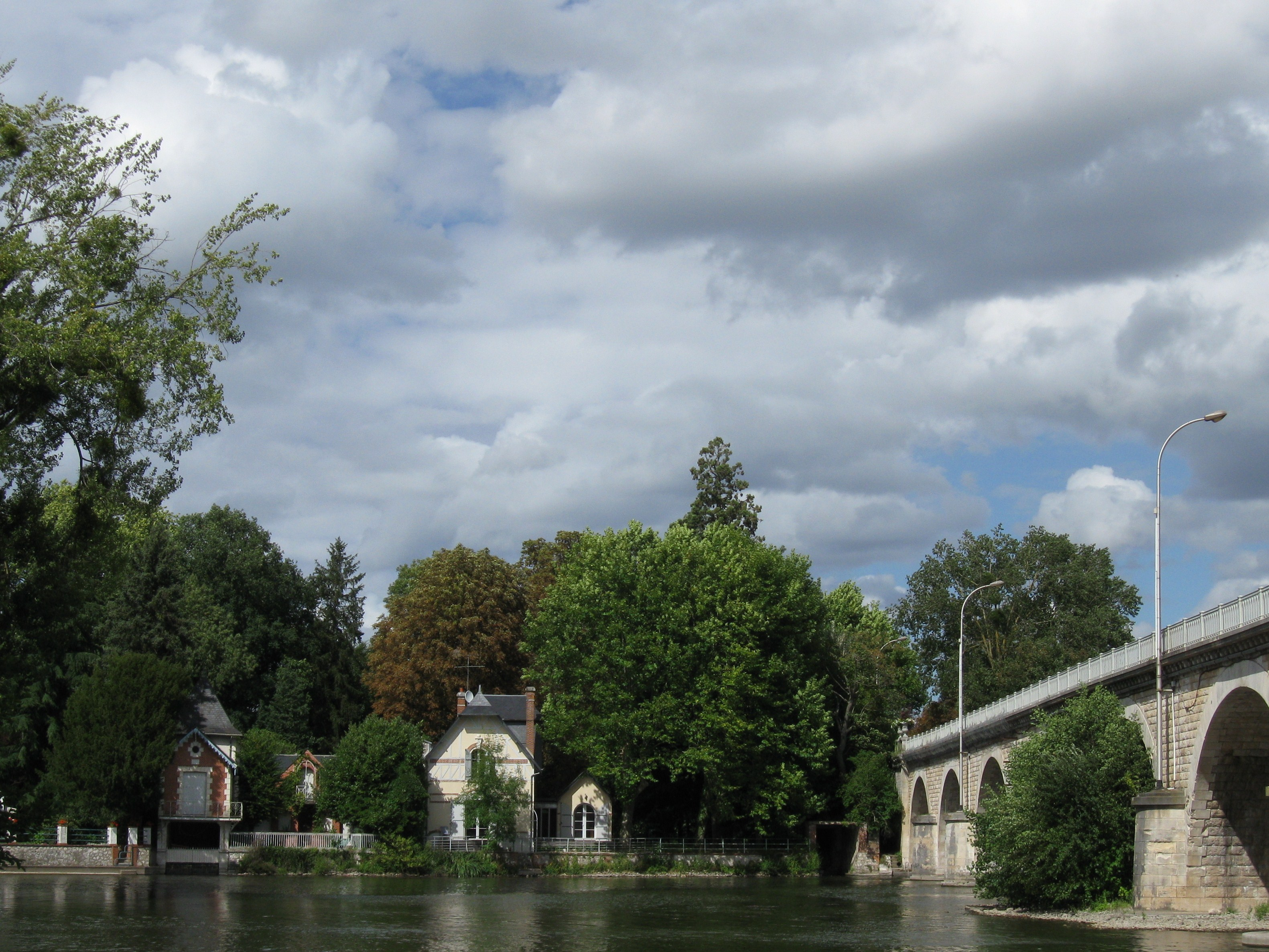 Pont sur le Loiret, Olivet, Loiret, France. Côté amont. En rive gauche (en face), maison avec garage à bateau.